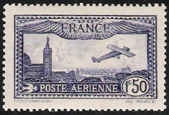 Avion survolant Marseille de 1F50 bleu. Gravé par Abel Mignon (1861-1936) et dessiné par Paul Albert Laurens (1870-1934), ce timbre est donc dans le domaine public.